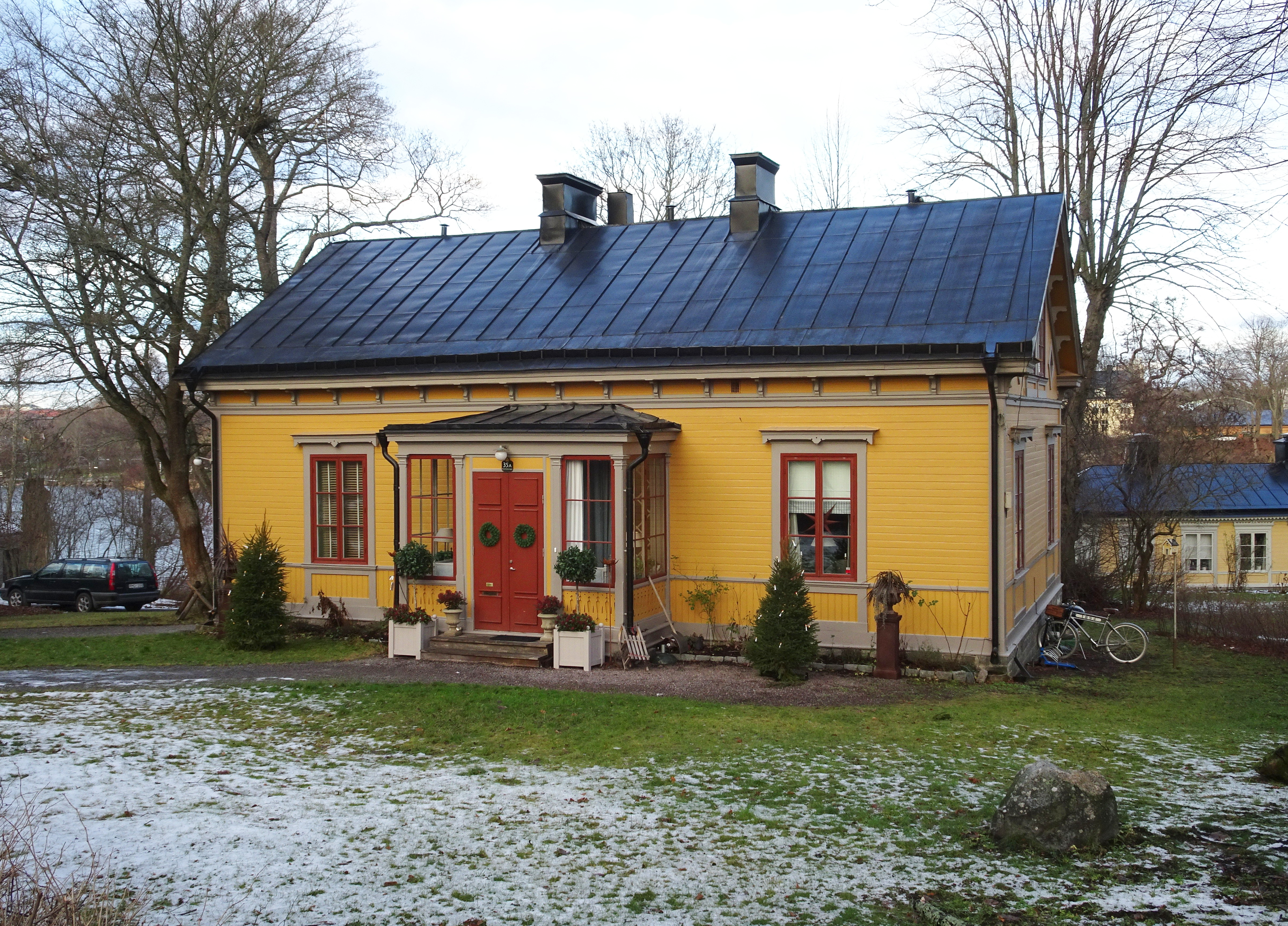 Kavaljersflygeln, Rosendals slott (1880-tal)